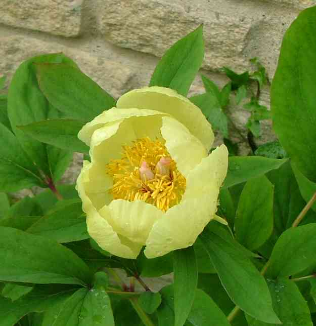 Paeonia daurica subsp. mlokosewitschii